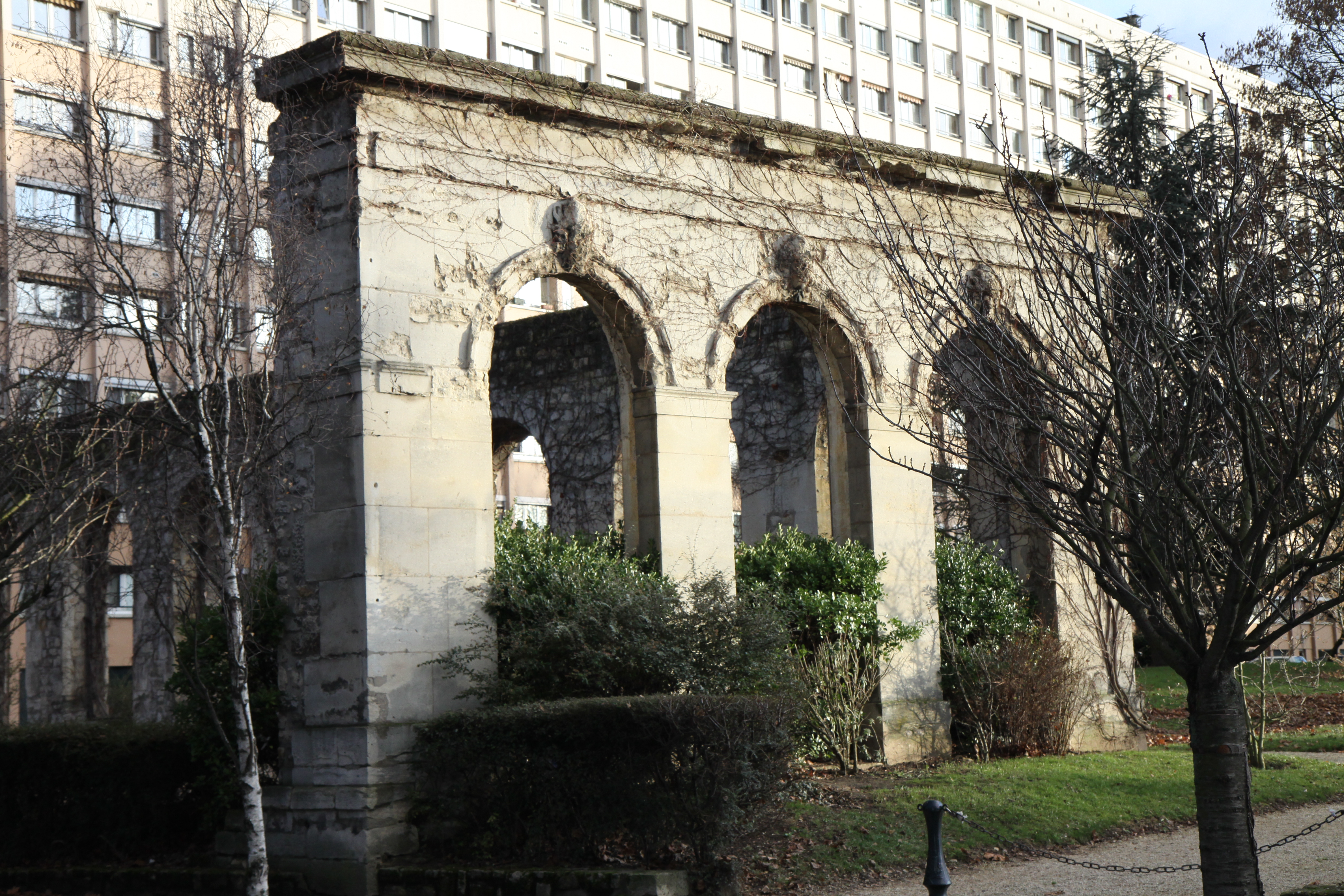 Vestiges de l'orangeraie de château Gaillard à Maisons-Alfort.